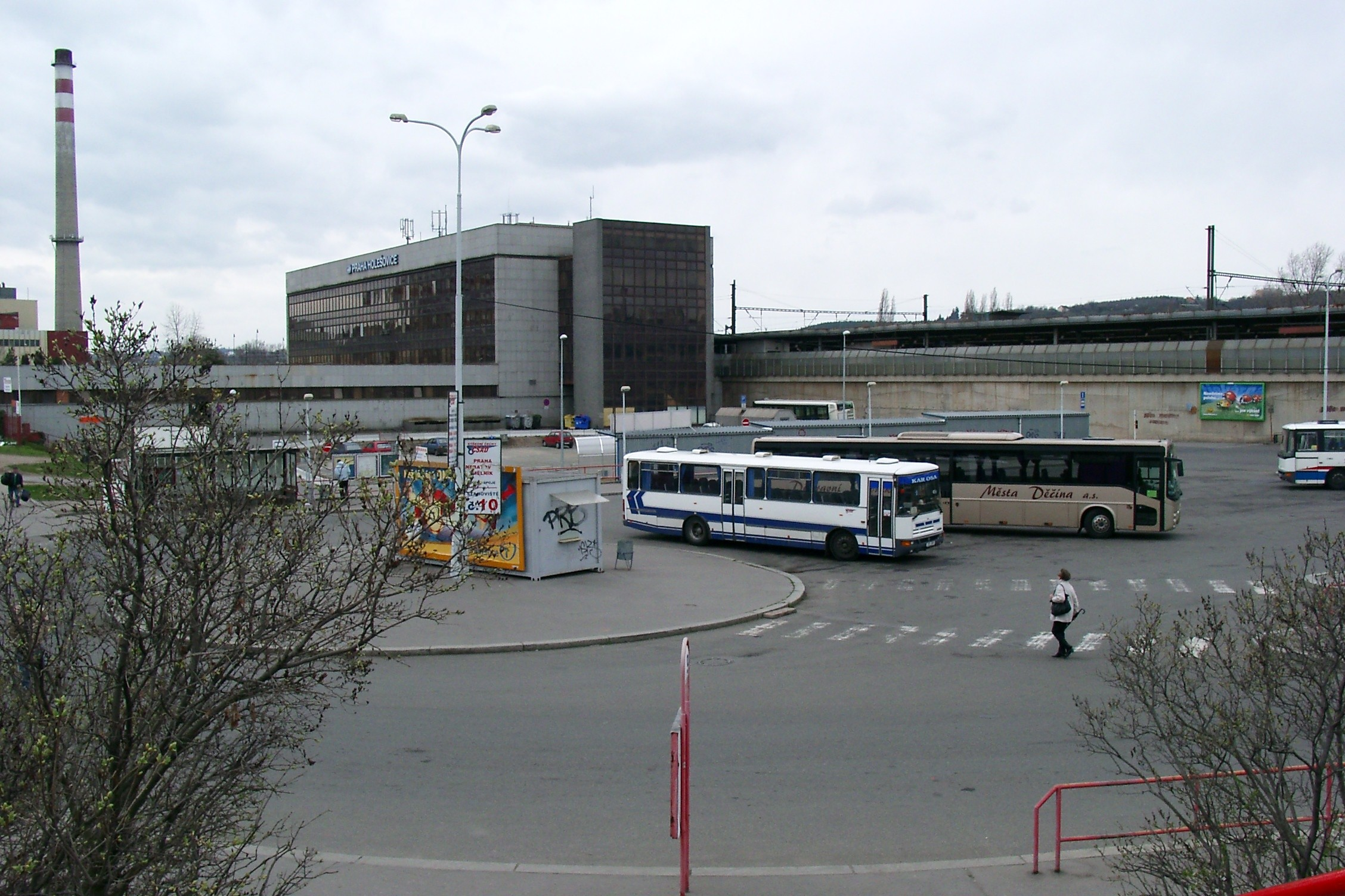 Prague, railway station Praha-Holešovice, with a part of its bus station, from the southeast. Autobusy dopravců ČSAD Střední Čechy a Dopravní podnik města Děčína.